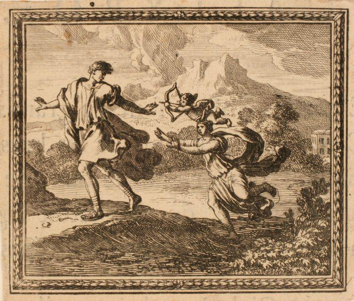 Les Métamorphoses d'Ovide : Byblis poursuivant de son amour son frère Caunus. 4e quart 17e siècle.[1]